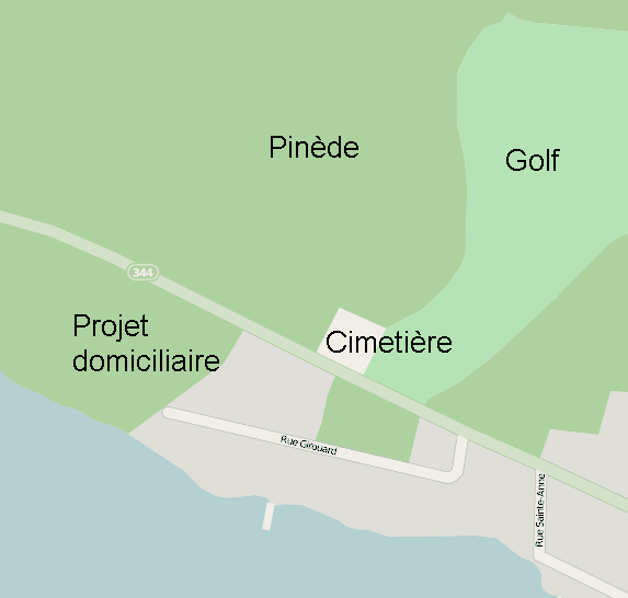 Carte du territoire au coeur de la crise d'Oka de 1990